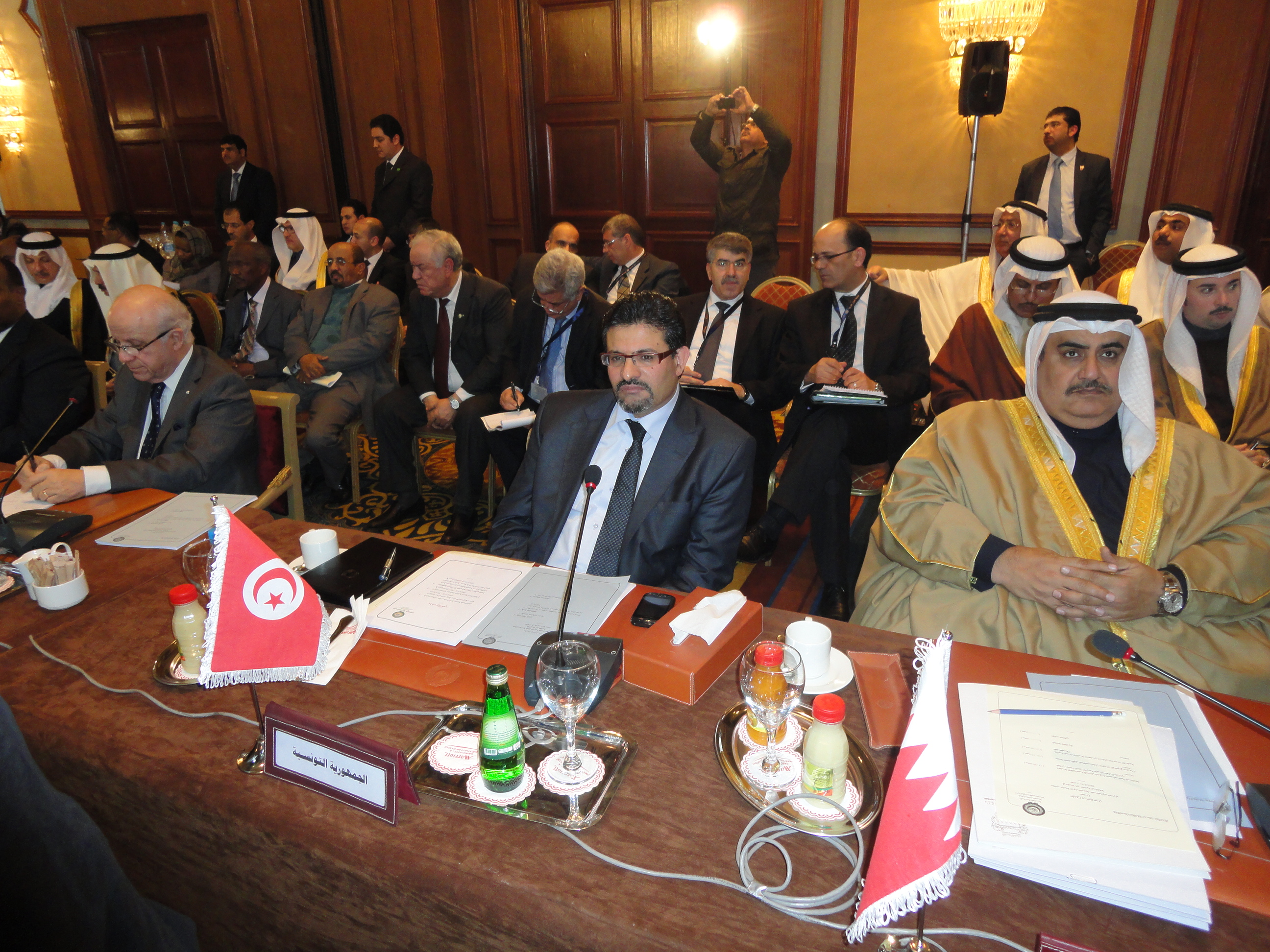 Le Ministre des Affaires Etrangères, Dr Rafik Abdessalem a annoncé, dimanche au Caire, la tenue à Tunis le 24 février courant d'une conférence internationale sur la Syrie.